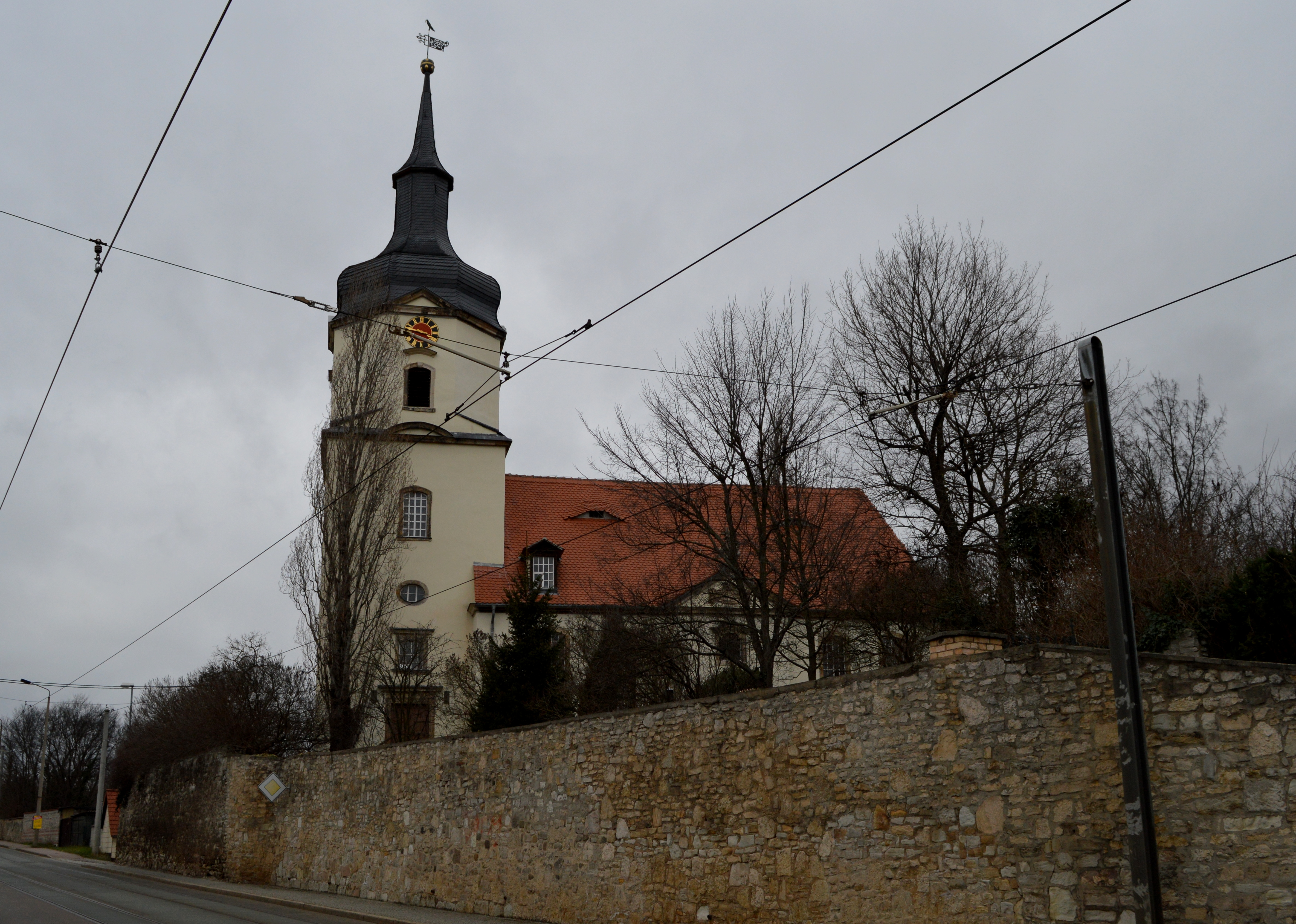 Kirche in Schkopau